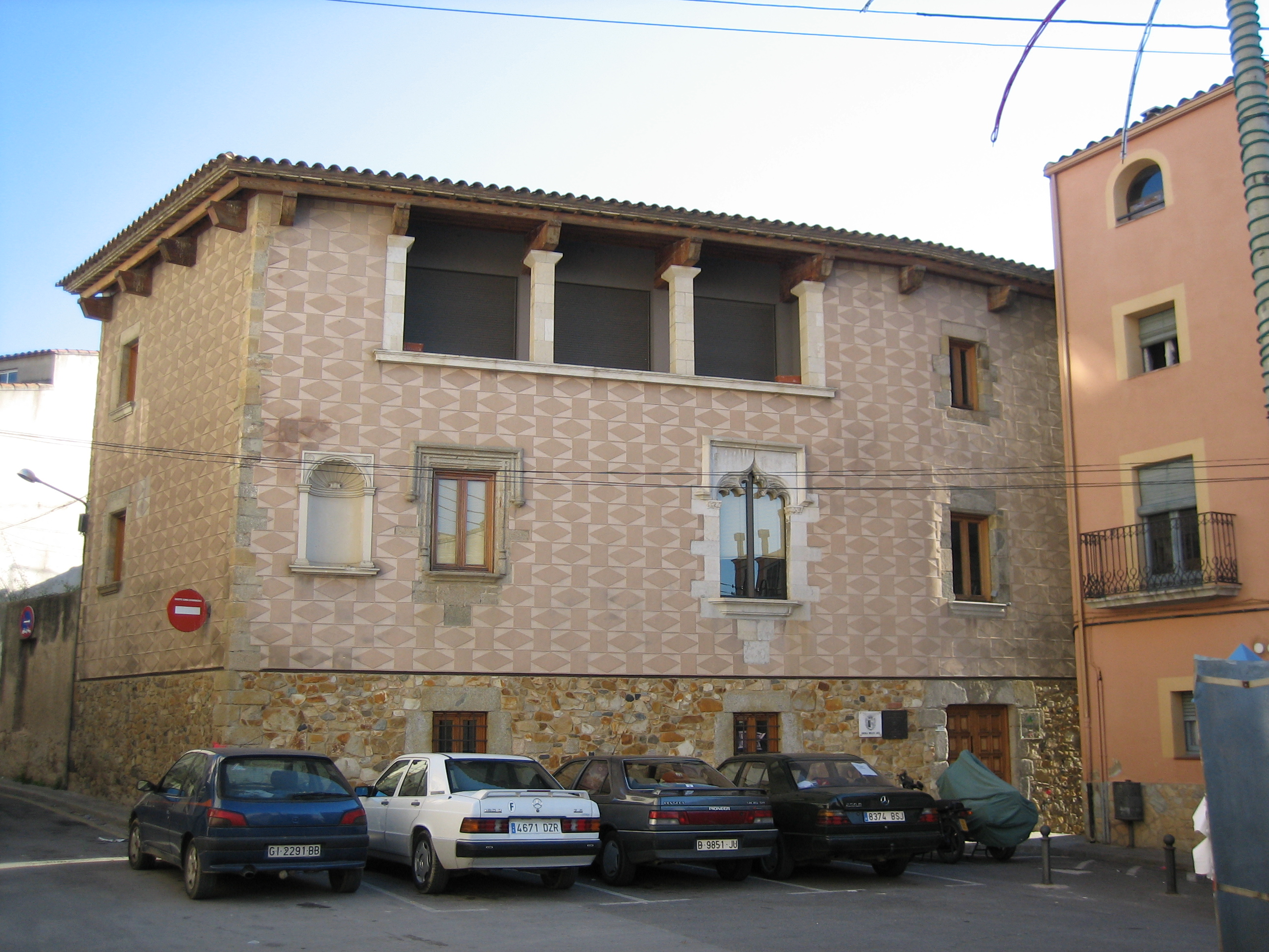 Casa de les Vídues de Llagostera (Biblioteca Municipal Julià Cutillé)